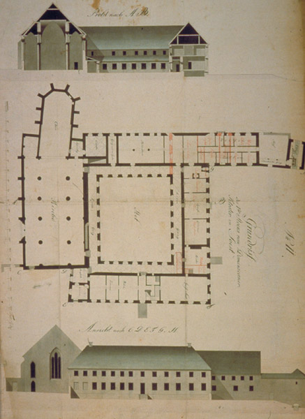 Plan und Ansichten von Dominikanerkloster und -kirche St. Crux in Soest, 1813